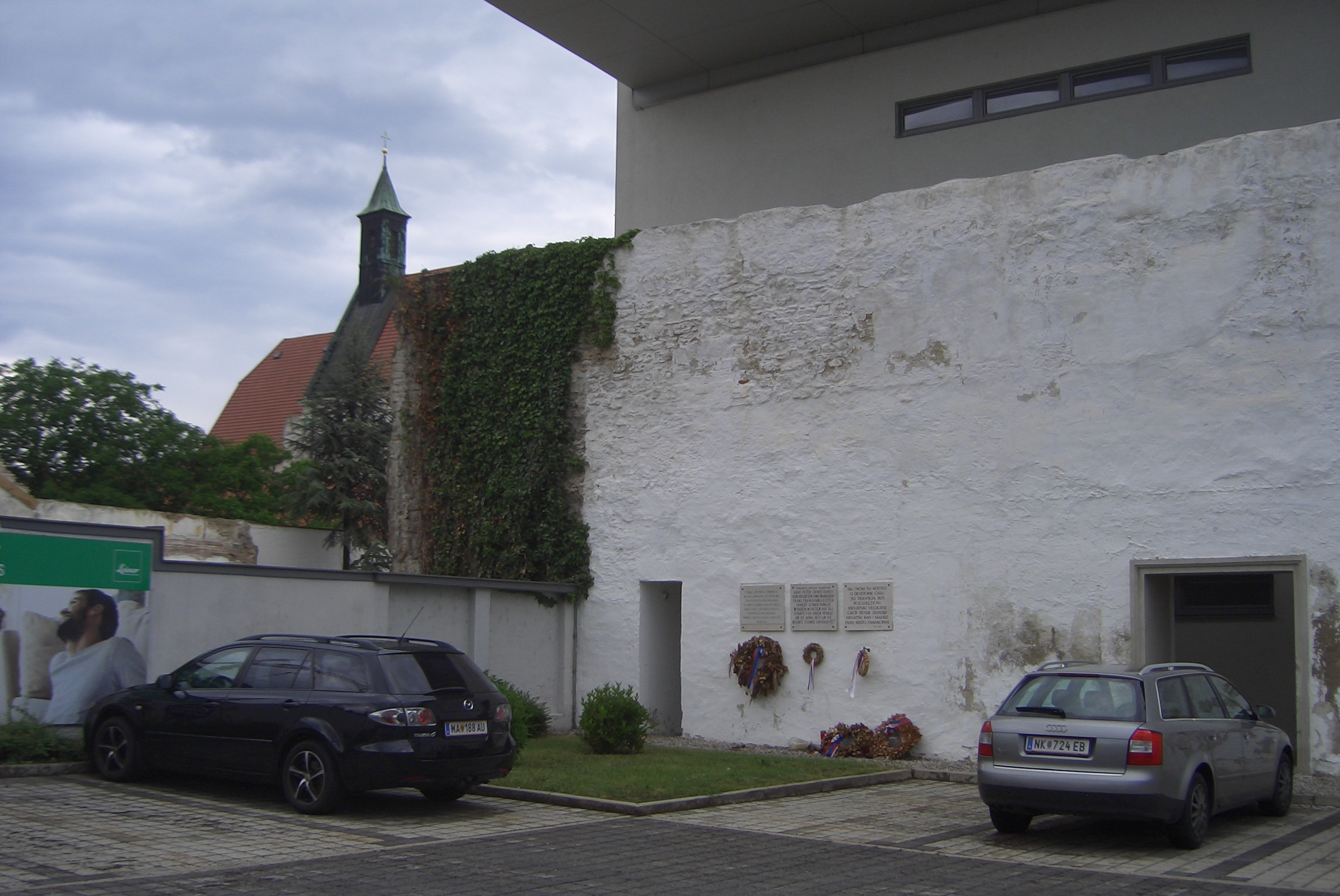 Ehemalige Hinrichtungsstätte von Petar Zrinski and Fran Krsto Frankapan (enthauptet 1671), am Stadtmauer Süd von Wiener Neustadt. Teile der Stadtmauer später abgerissen, und zu Bräuhaus umgebaut. Heute Parkplatz beim Leiner-Warenhaus. (Ecke Lederergasse und Bräuhausgasse. Gedenktafel mit Aufschiften auf Deutsch, Kroatisch und Lateinisch.